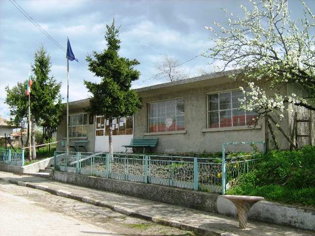 Сградата на кметството на село Горна Кабда (бивш частен дом). Фото: Вл. Стойков - април 2008 год.